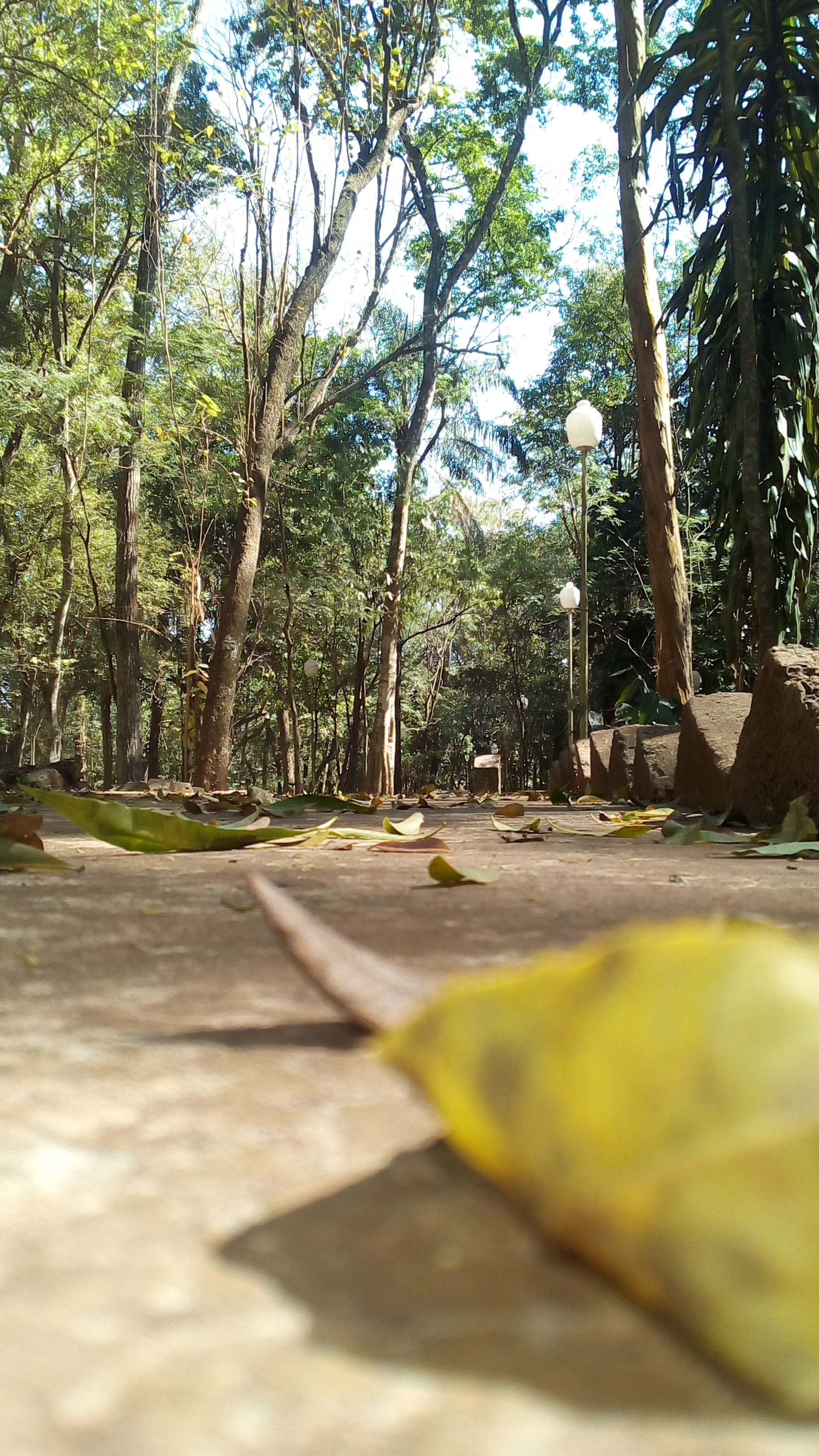 Reserva Natural Municipal Luis Honorio Rolon, área natural protegida, de aproximadamente 10Has que tiene ejemplares de la selva paranaense. Cumple el objetivo de recreación y educación para los escolares de la zona. Reserva Natural Municipal Luis Honorio Rolon